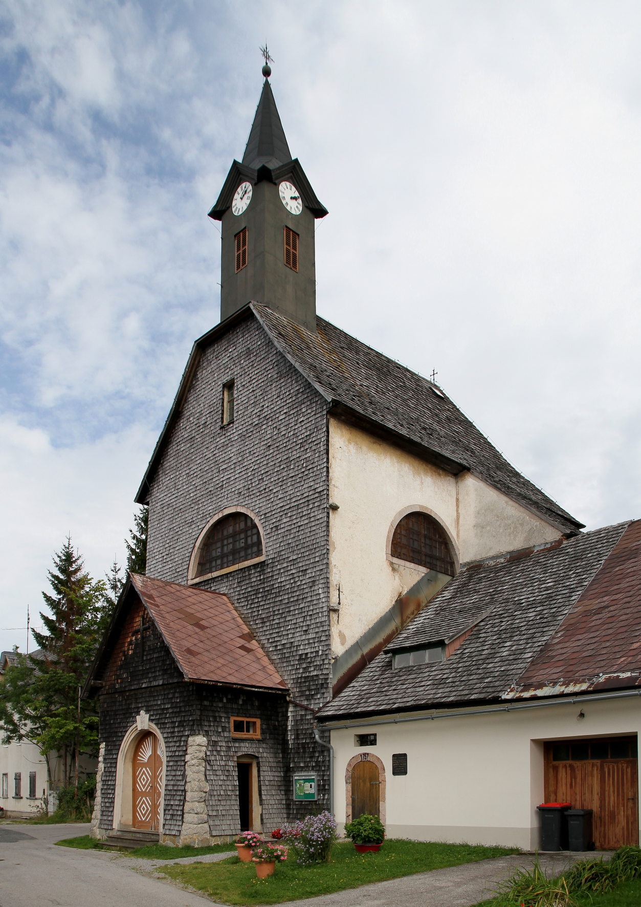 Kath. Pfarrkirche hl. Josef in Josefsberg, eine Ortschaft in der niederösterreichischen Gemeinde Mitterbach am Erlaufsee.